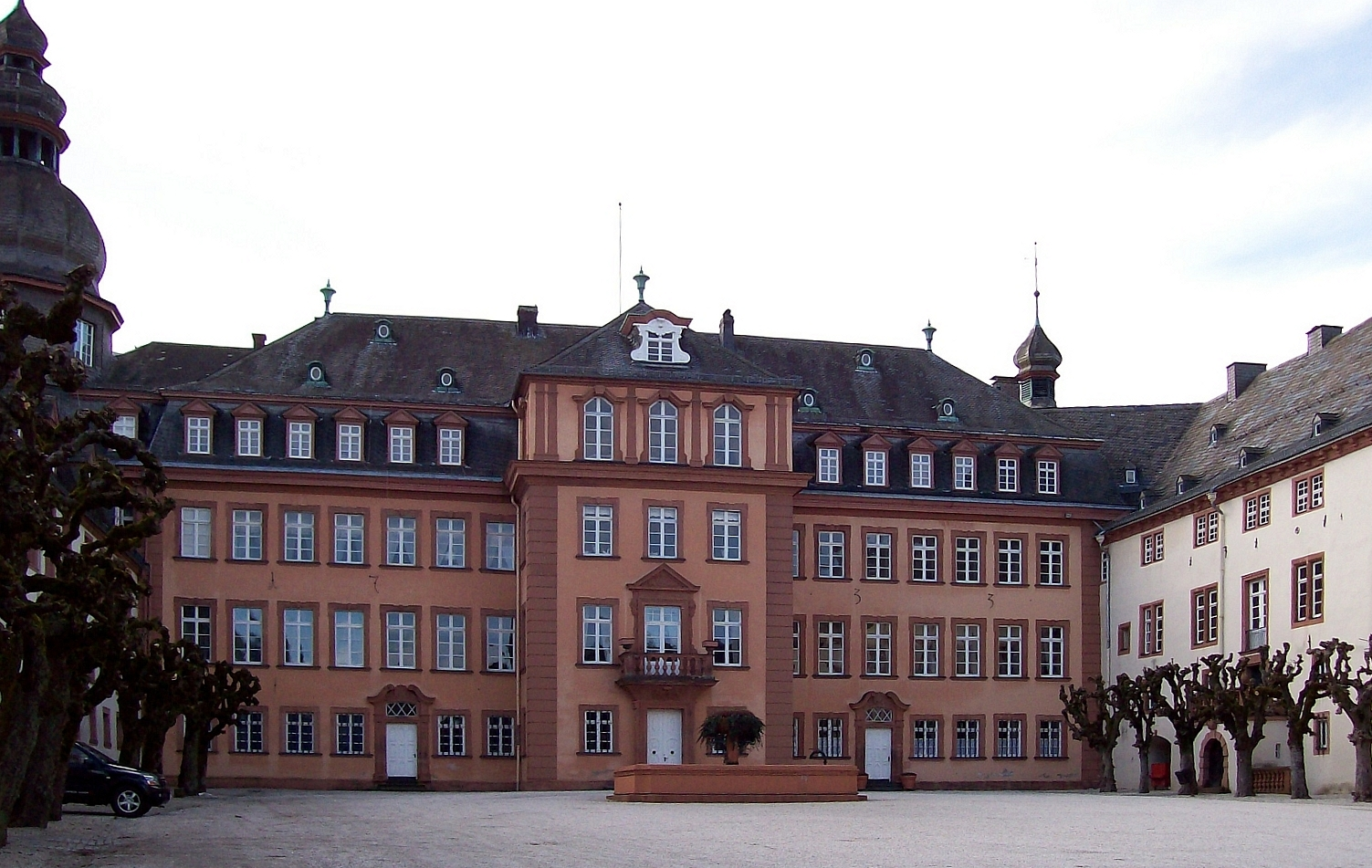 Schloss Berleburg in Bad Berleburg (Germany)